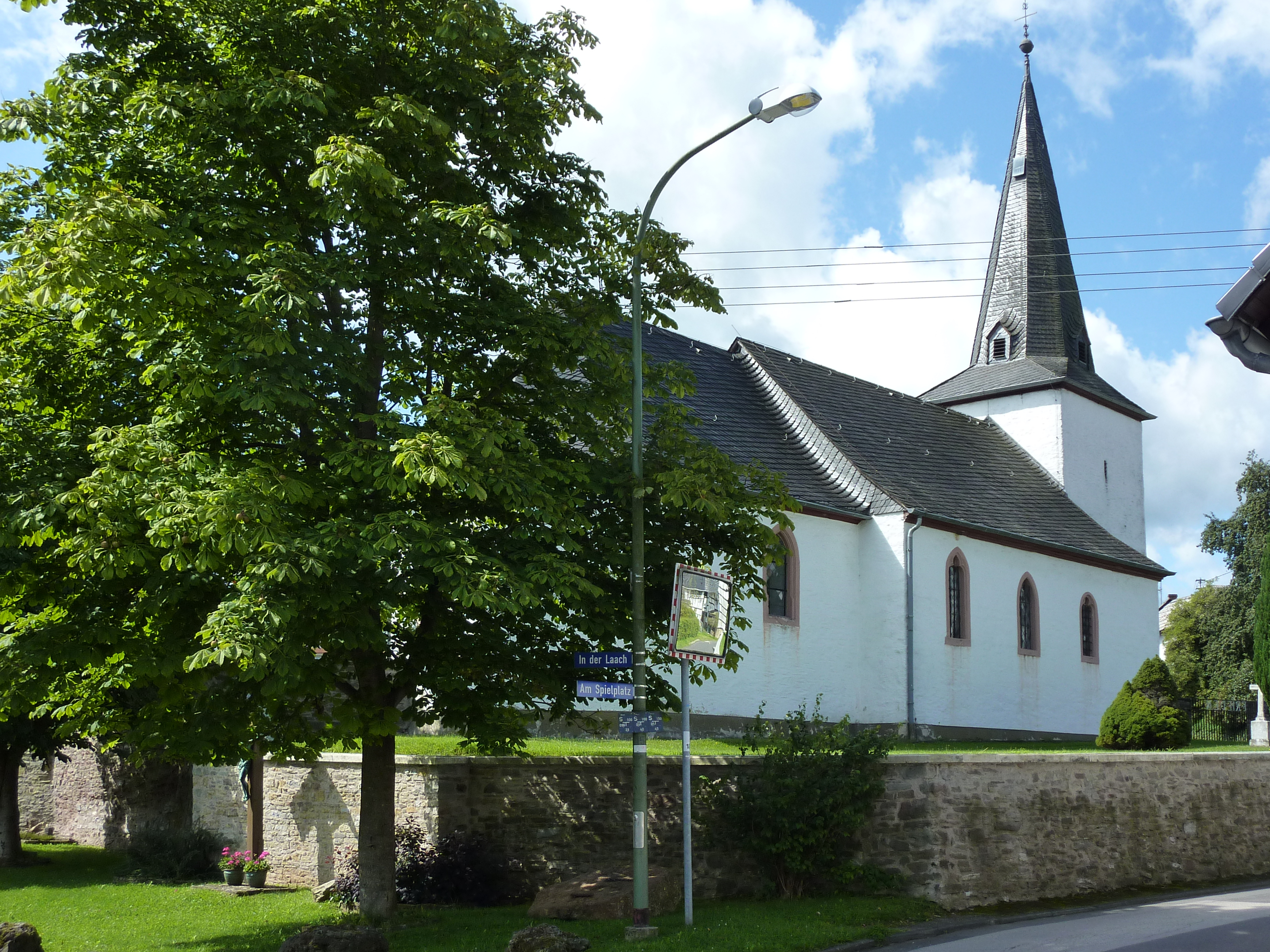 Reetz, Oberdorf 1, kath. Pfarrkirche 1, v. SO